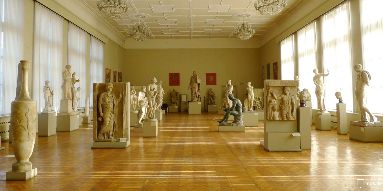 Экспозиция учебного музея Ивана Цветаева в РГГУ